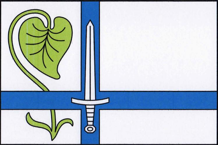 vlajka Kostelec u Heřmanova Městce